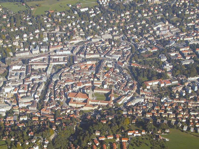 Luftbild der Stadt St.Gallen (aus dem Heißluftballon) Sky Fun Ballon AG, 9430 St. Margrethen, Schweiz Copyright Status: GNU Freie Dokumentationslizenz